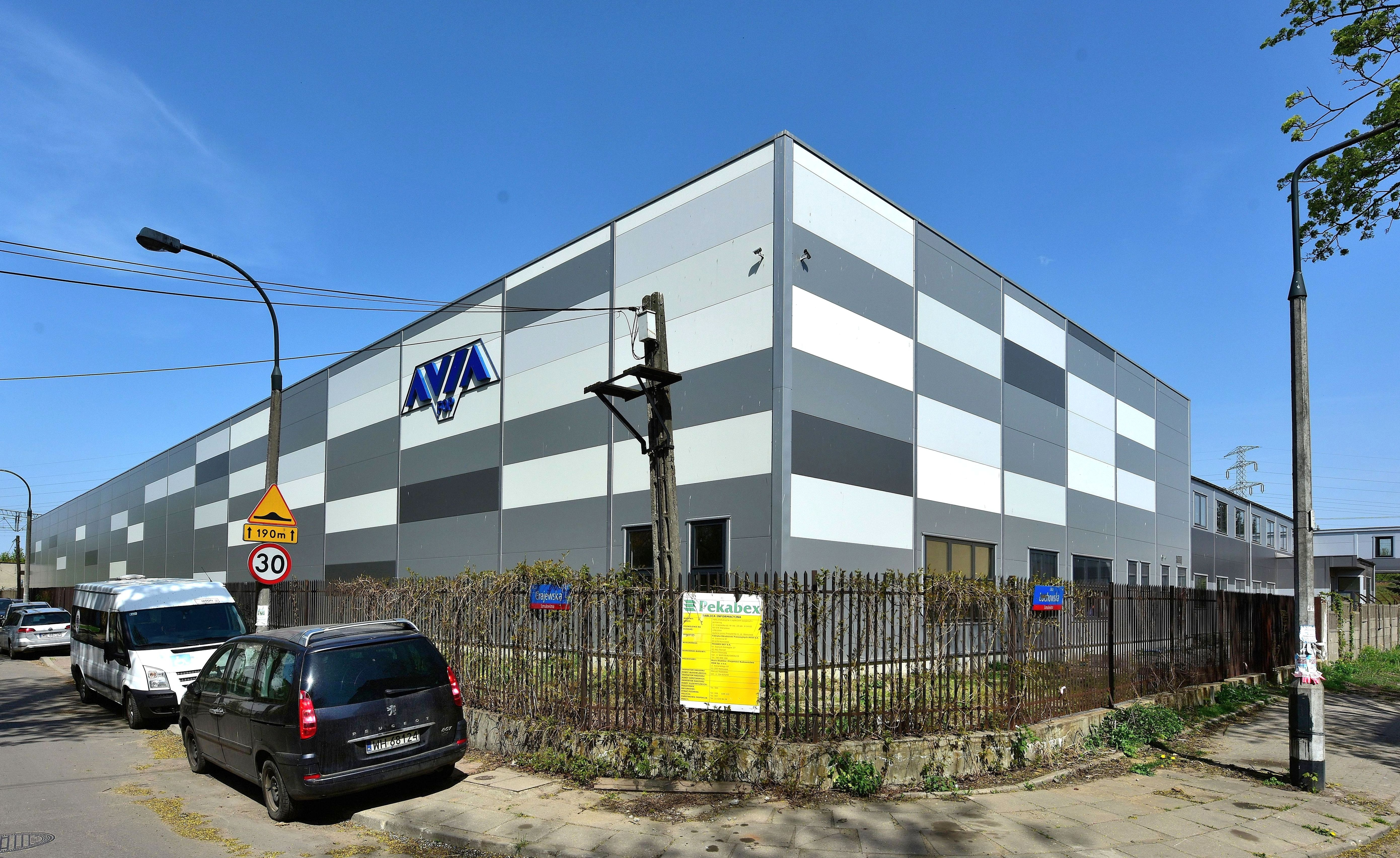 Nowa hala produkcyjna Fabryki Obrabiarek Precyzyjnych Avia S.A. przy ul Grajewskiej róg Łochowskiej